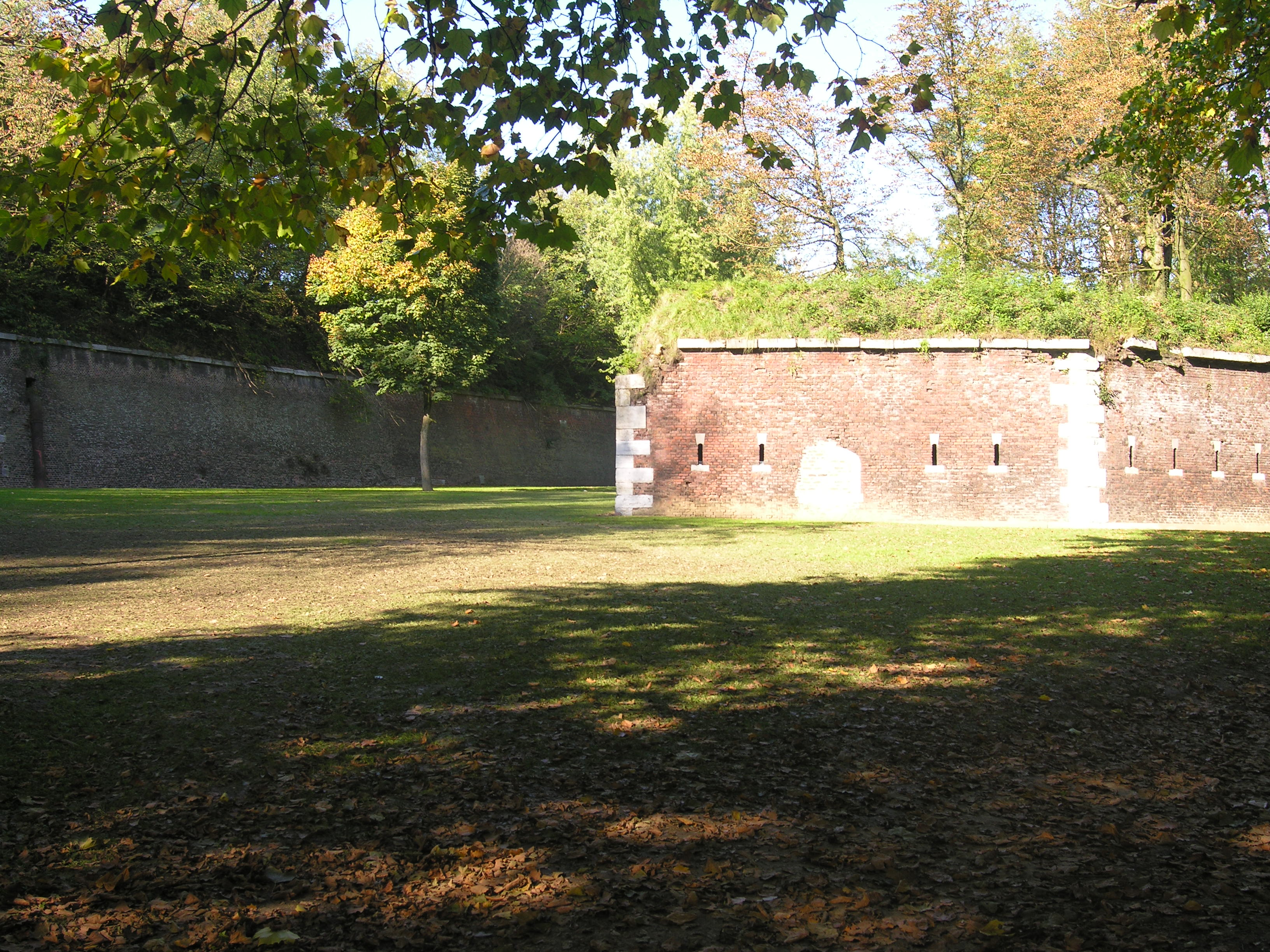 Liège, Parc de la Citadelle